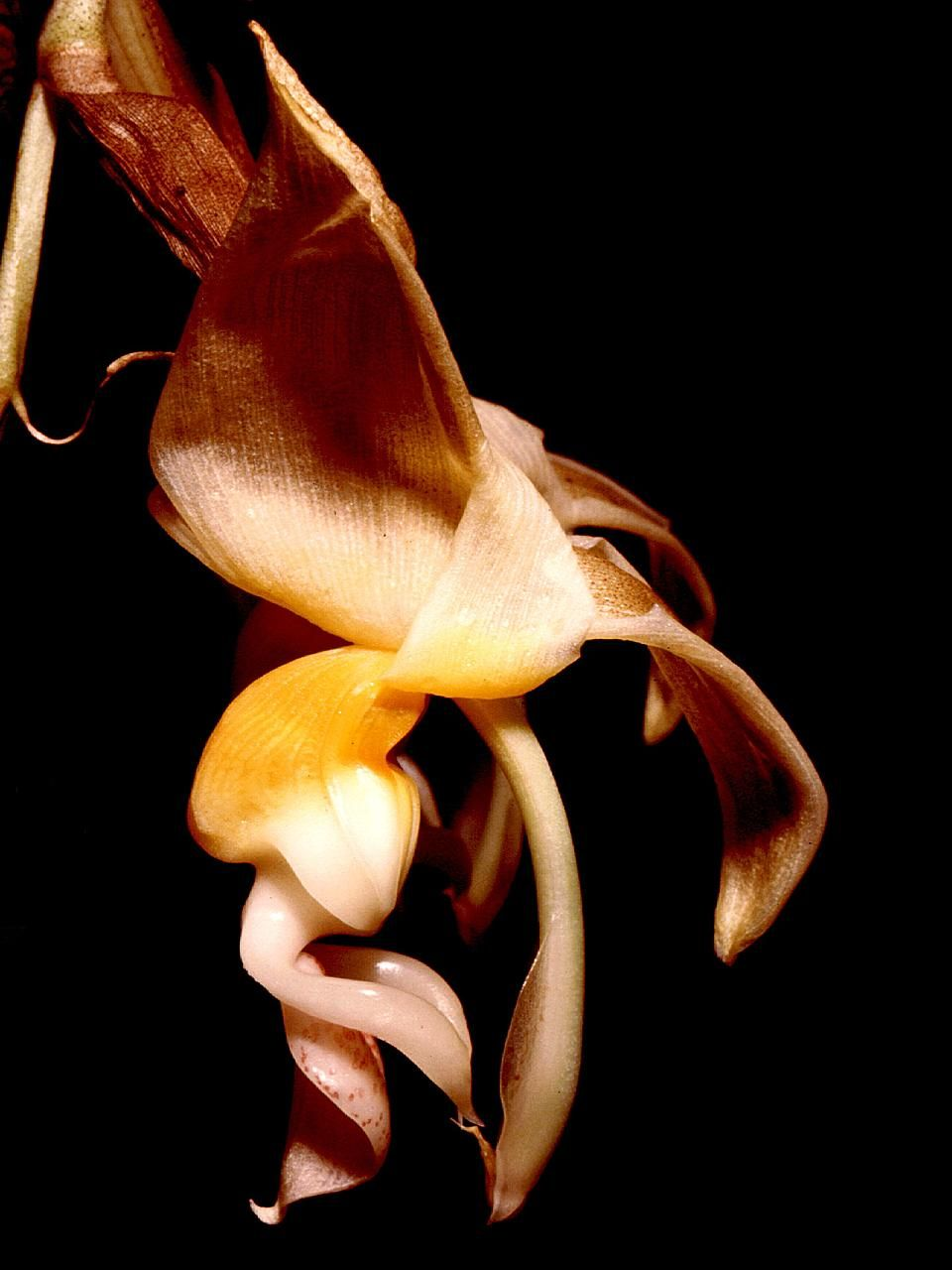 Stanhopea lietzei